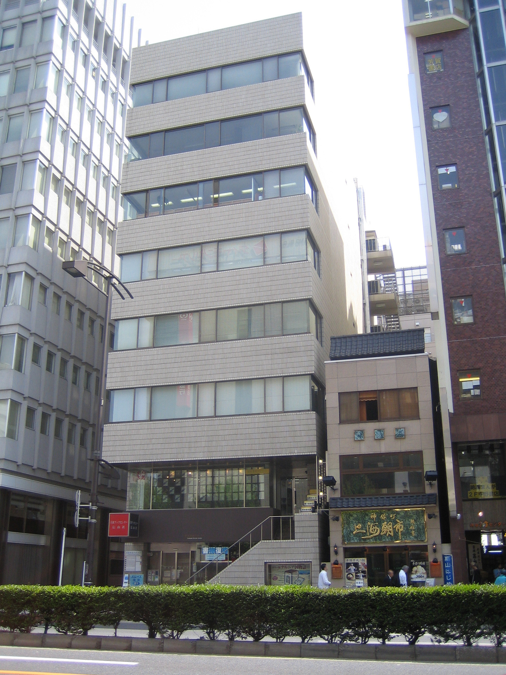 岩波ブックセンター。東京都千代田区神田神保町 Iwanami Book Center (岩波ブックセンター), at Kanda-Jinbocho (神田神保町 Kanda-Jinbōchō), Chiyoda, Tokyo, Japan